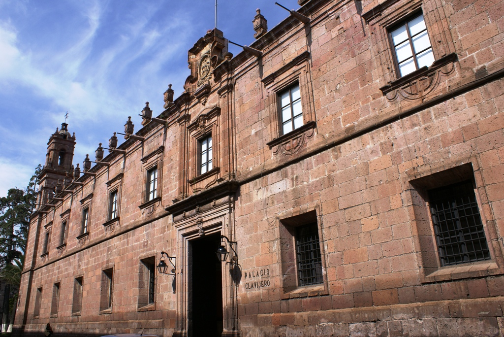 El Centro Cultural Clavijero se ubica en la ciudad de Morelia, Michoacán, México, es un centro cultural público dedicado albergar exposiciones temporales de instituciones culturales públicas y privadas. El recinto tiene su sede en lo que fue el antiguo Colegio de la Compañía de Jesús, de estilo barroco del siglo XVIII.